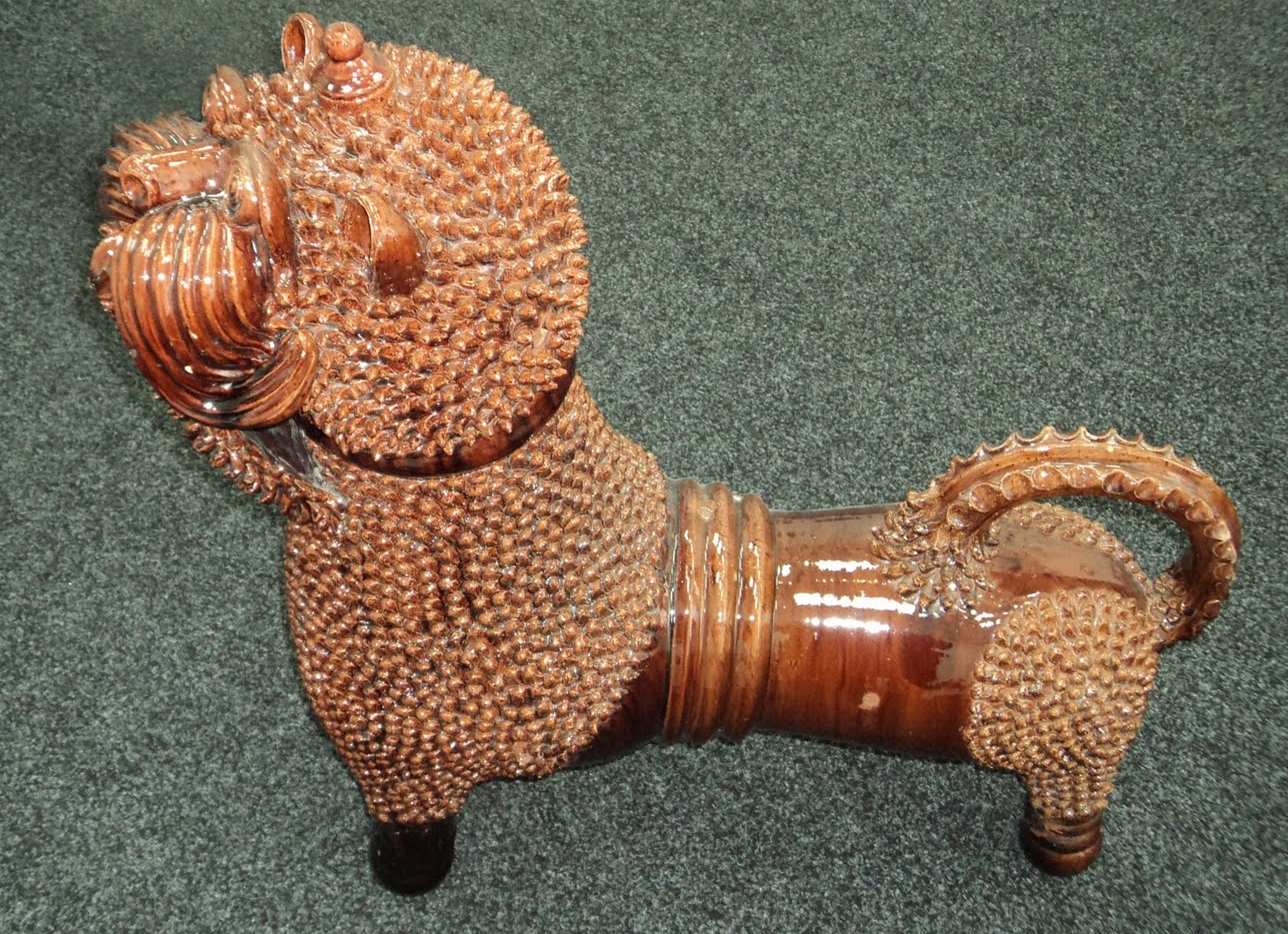 Гончарний виріб Івана Білика